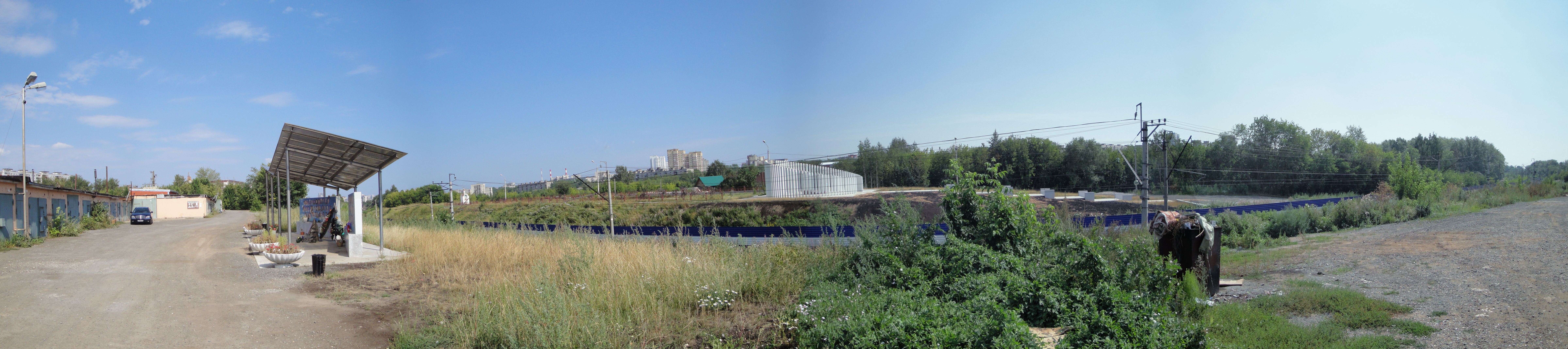 Общий вид на месте падения самолёта Боинг-737-500 14.09.2008 по состоянию на 14 августа 2011 года. На переднем плане часть мемориала в Индустриальном районе, за железной дорогой часть мемориала (в том числе часовня) в Свердловском районе.